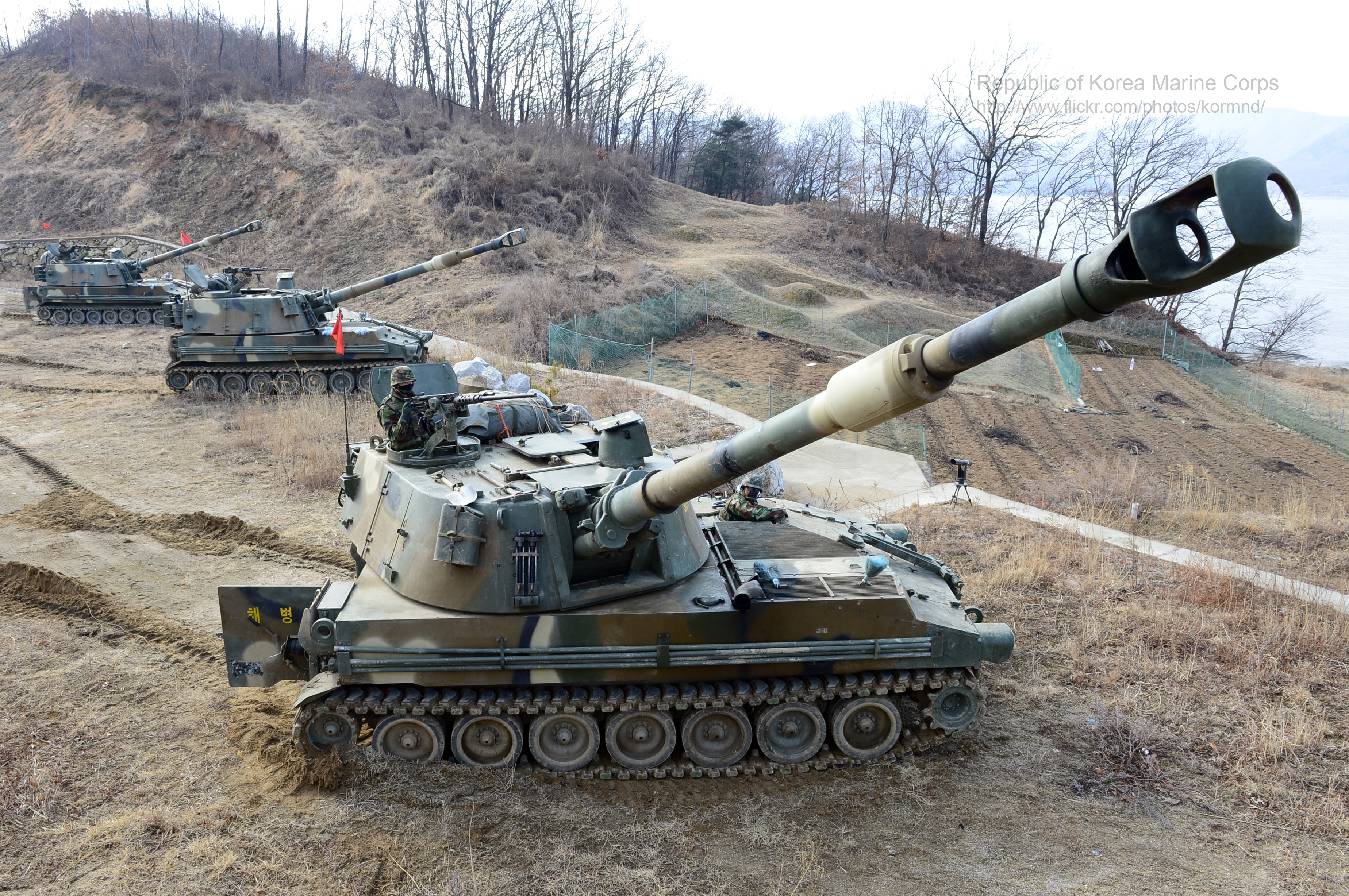 해병대 장병들이 K-55 자주포를 이용해 적의 국지도발에 대비한 종합훈련을 실시하고 있다.